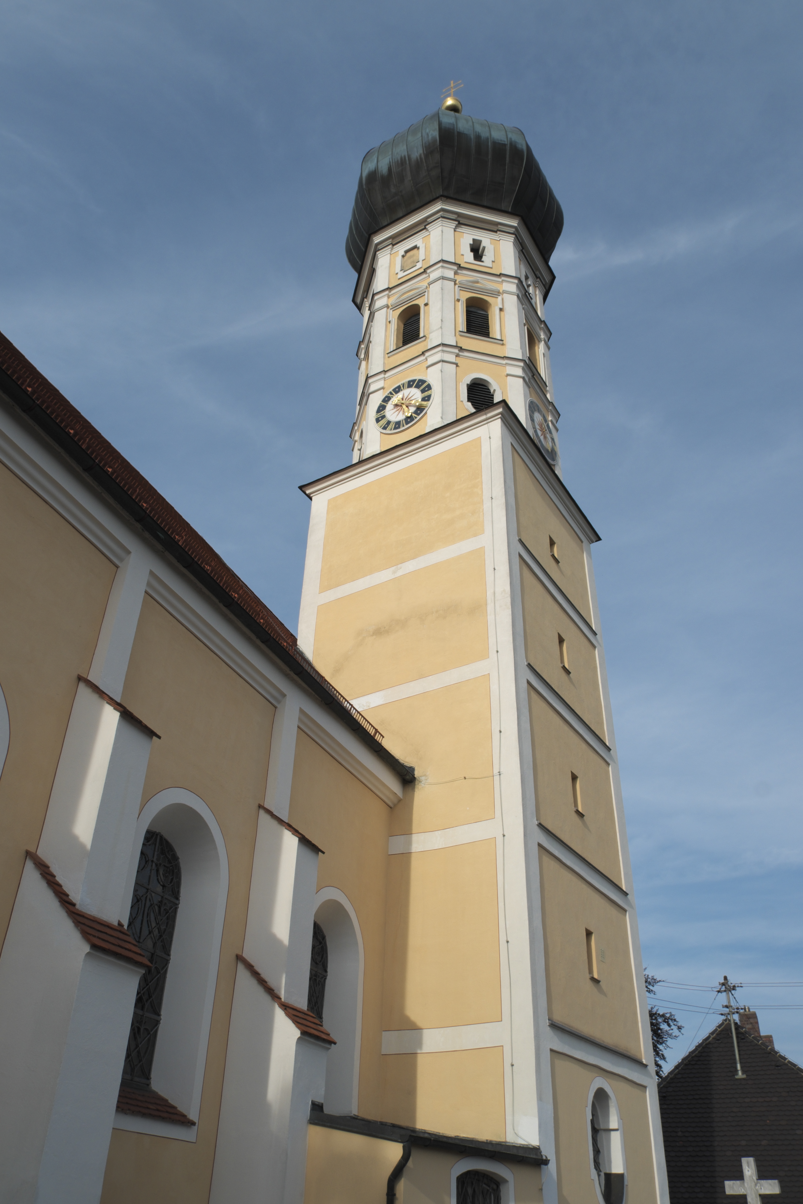 Katholische Pfarrkirche Mariä Himmelfahrt in Walleshausen, einem Ortsteil von Geltendorf im oberbayerischen Landkreis Landsberg am Lech (Bayern/Deutschland), Glockenturm mit Zwiebelhaube